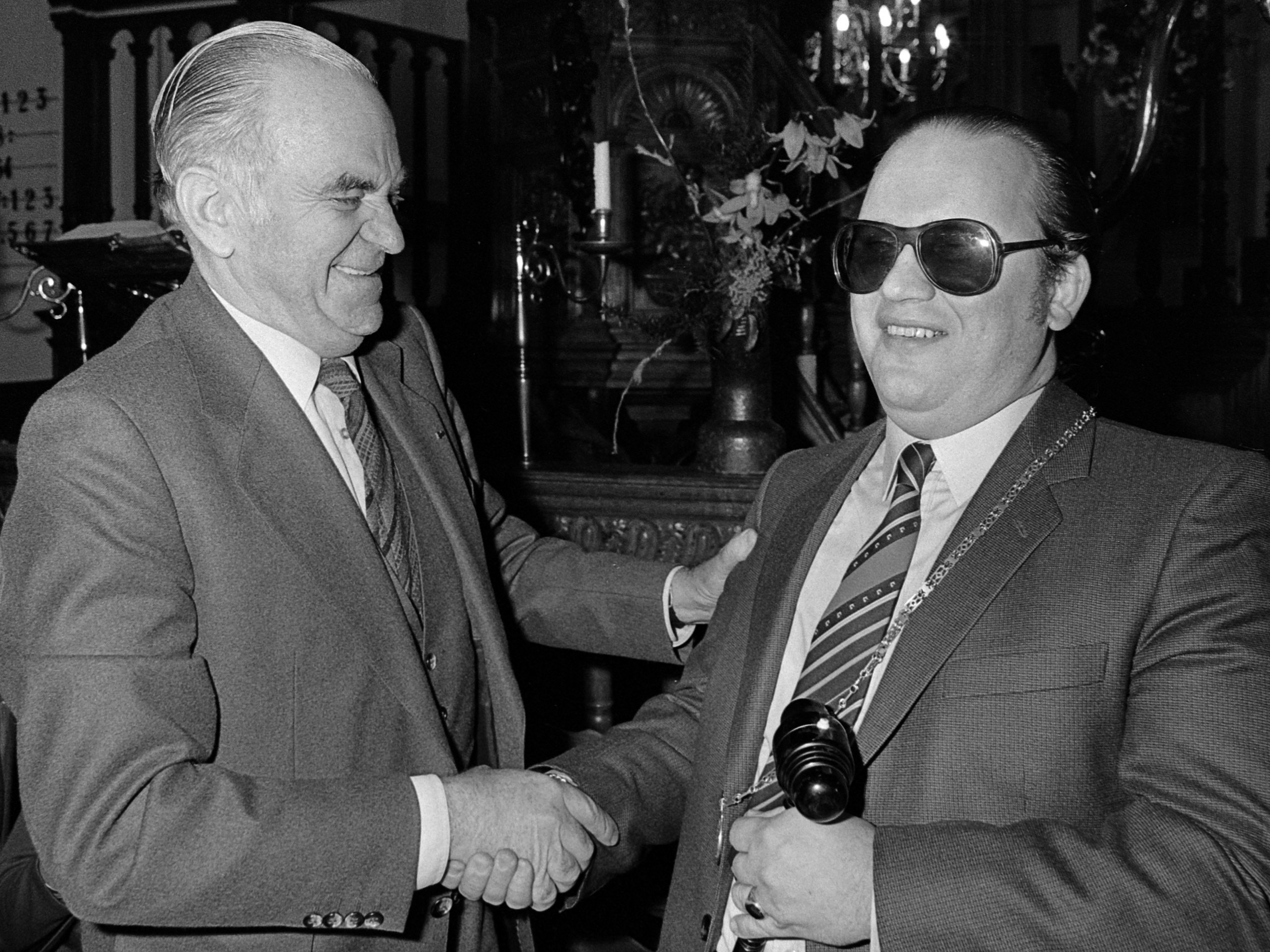 Installatie van de eerste blinde burgemeester in de Hervormde Kerk te Abcoude. Links loco-burgemeester W. van ter Mey die de voorzittershamer overdraagt aan dhr. Bestman 16 januari 1981